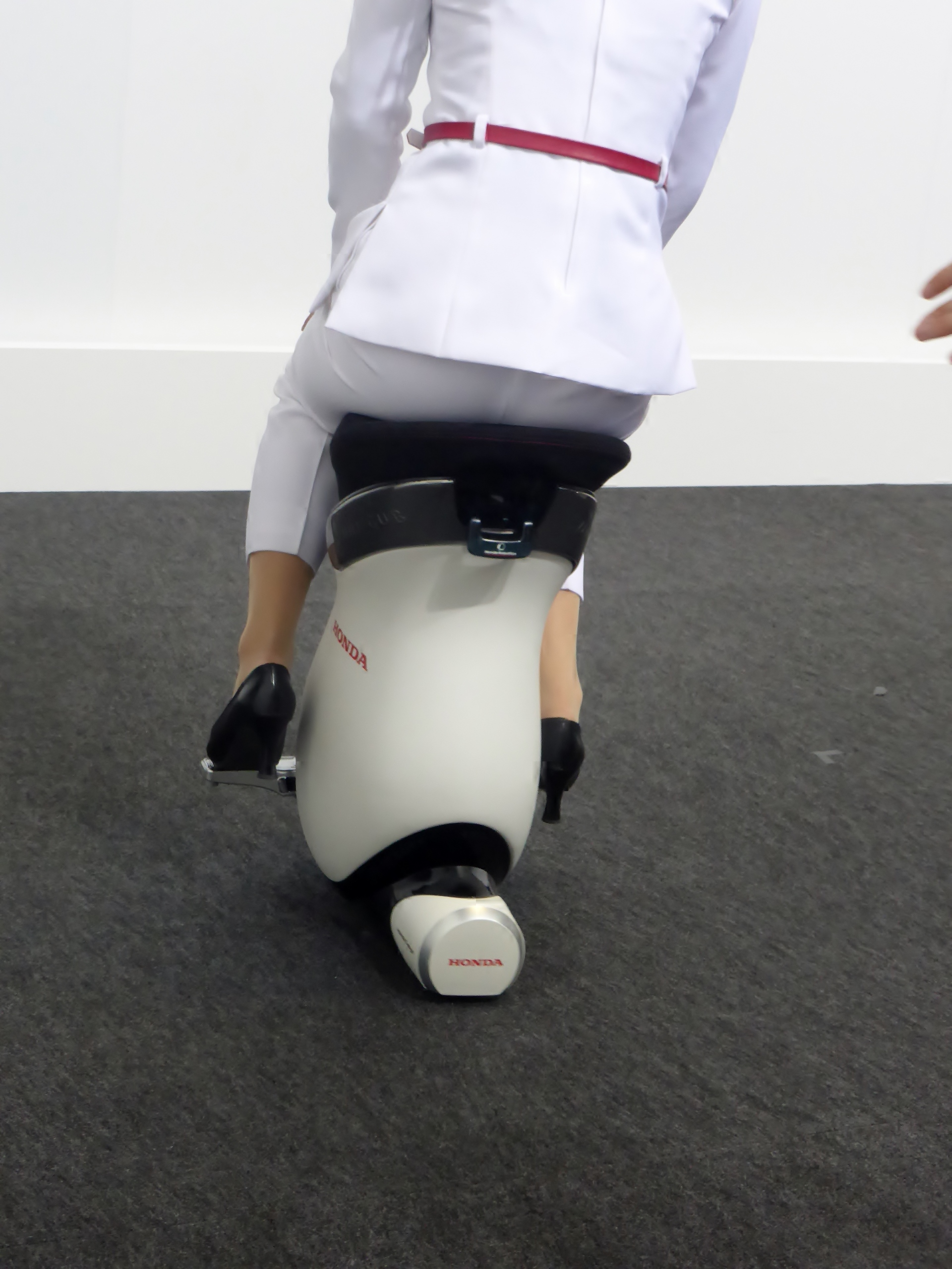 大阪モーターショー2013のホンダブースにおいてUNI-CUB βを撮影。